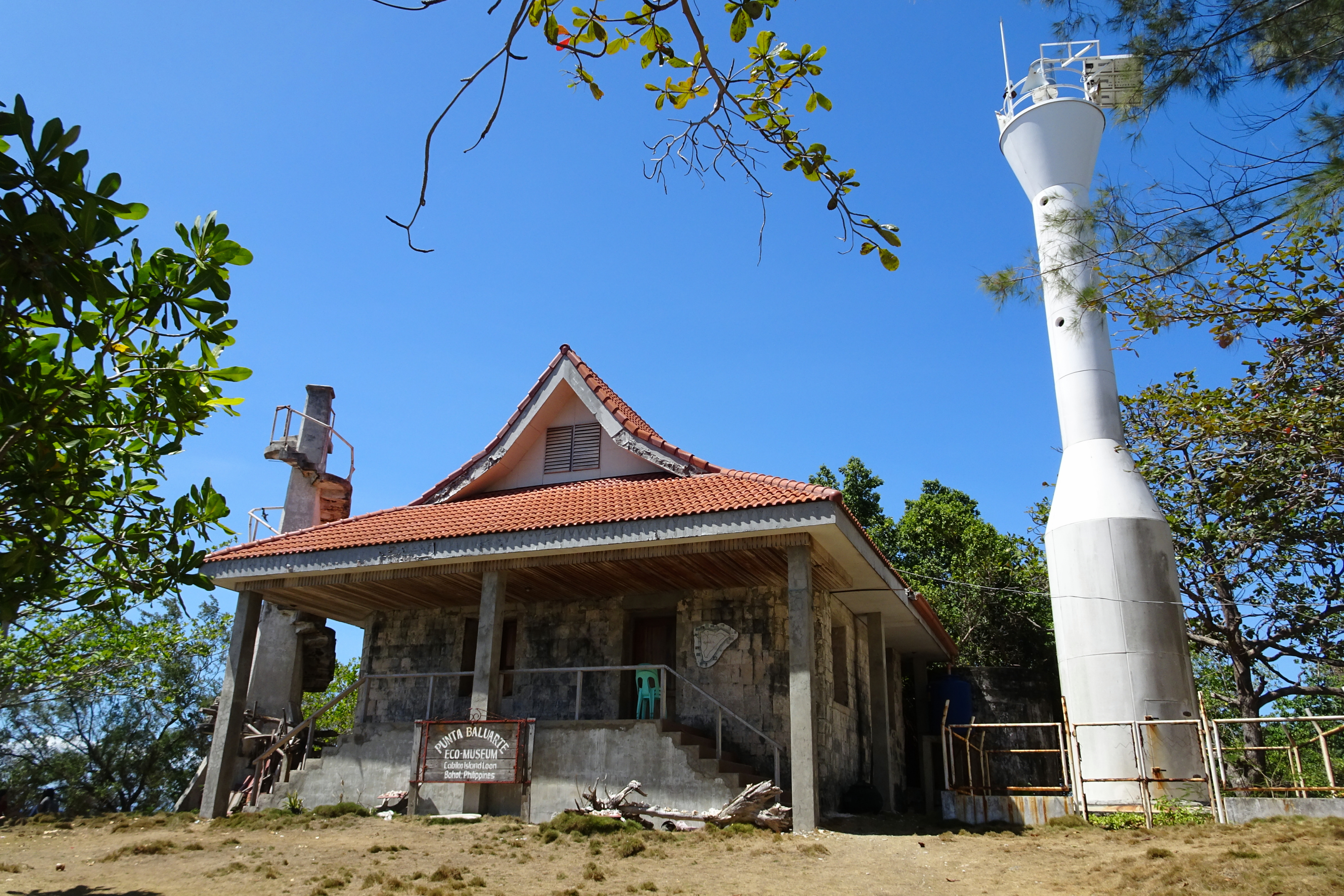 Cabilao Island, Bohol, Philippines